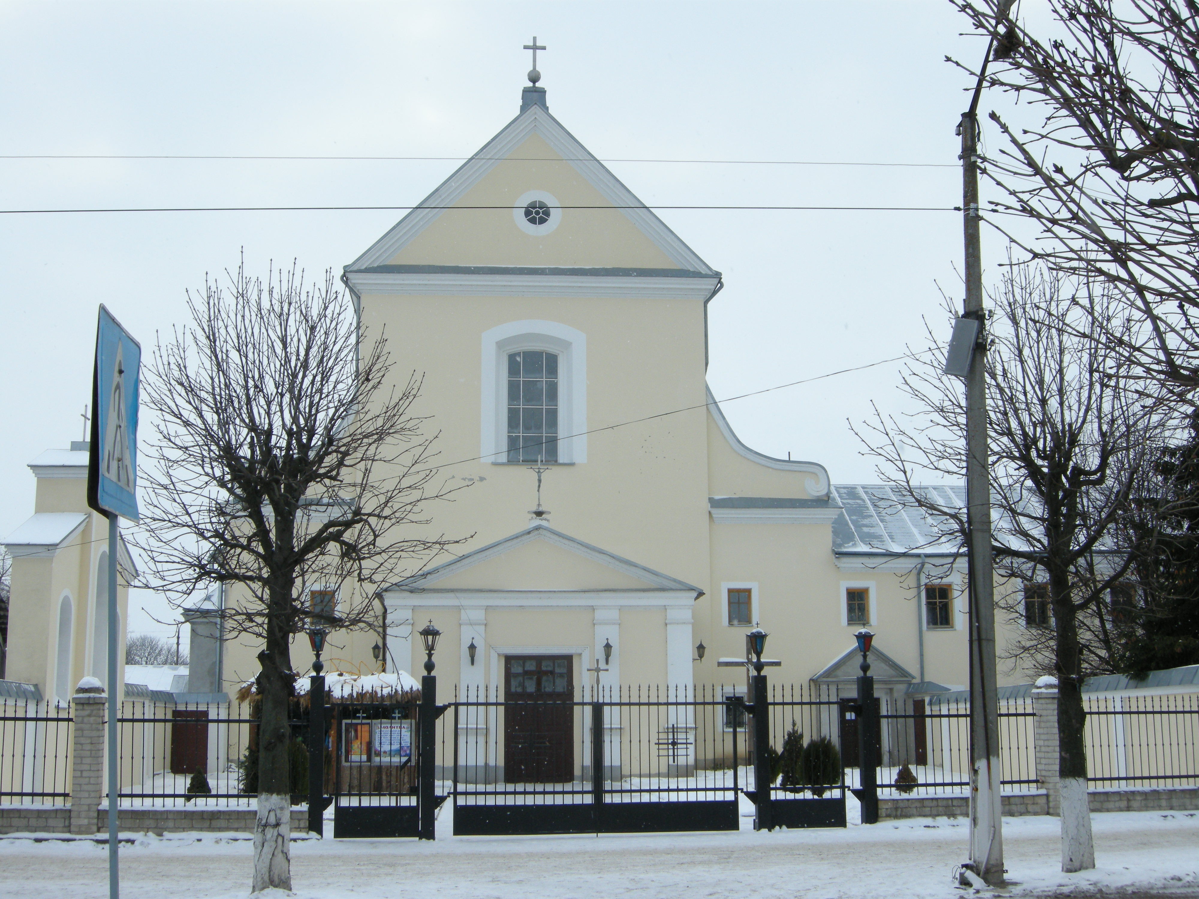 Монастир оо. Капуцинів у Костянтинові.